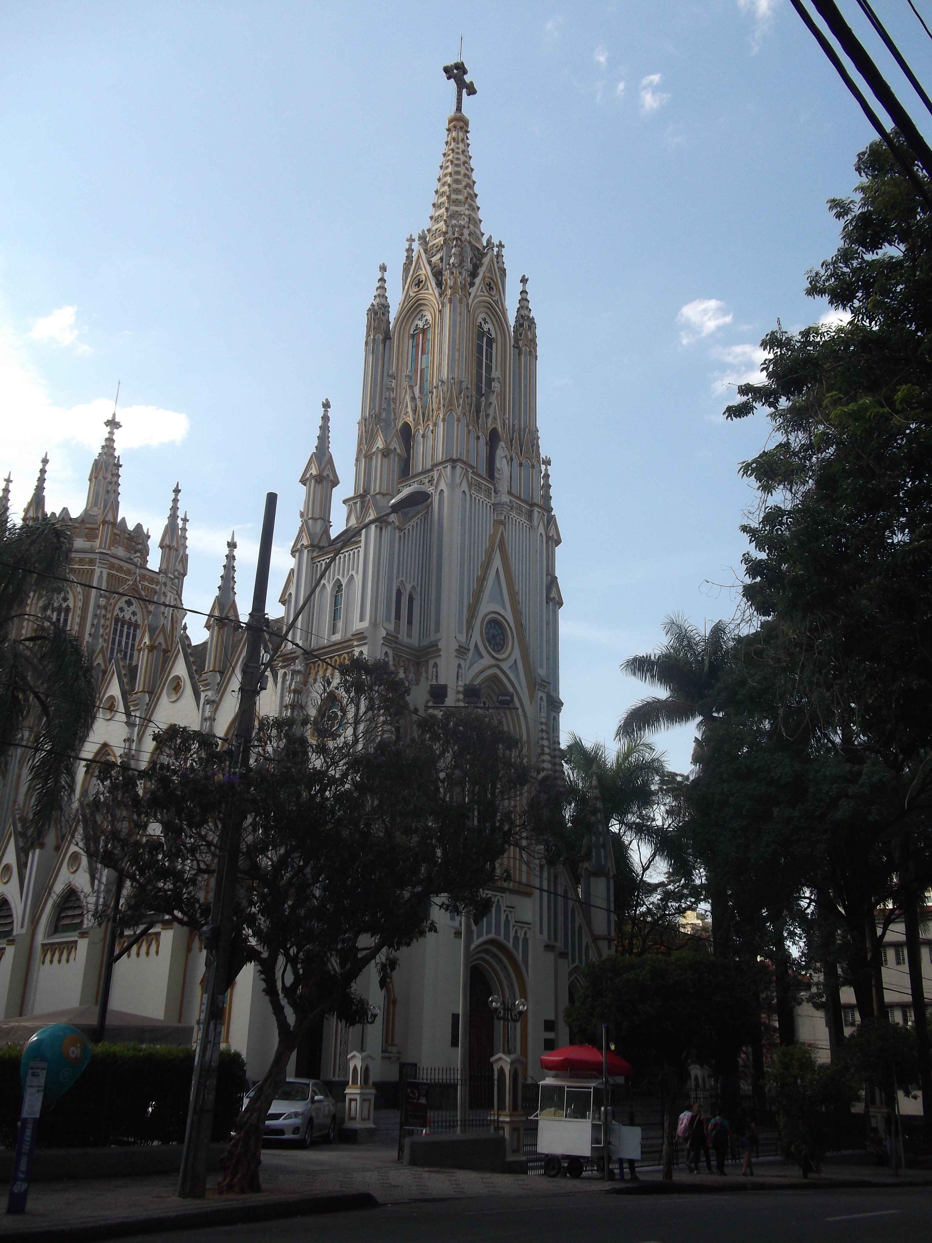 Basílica de Nossa Senhora de Lourdes, Belo Horizonte, Brasil